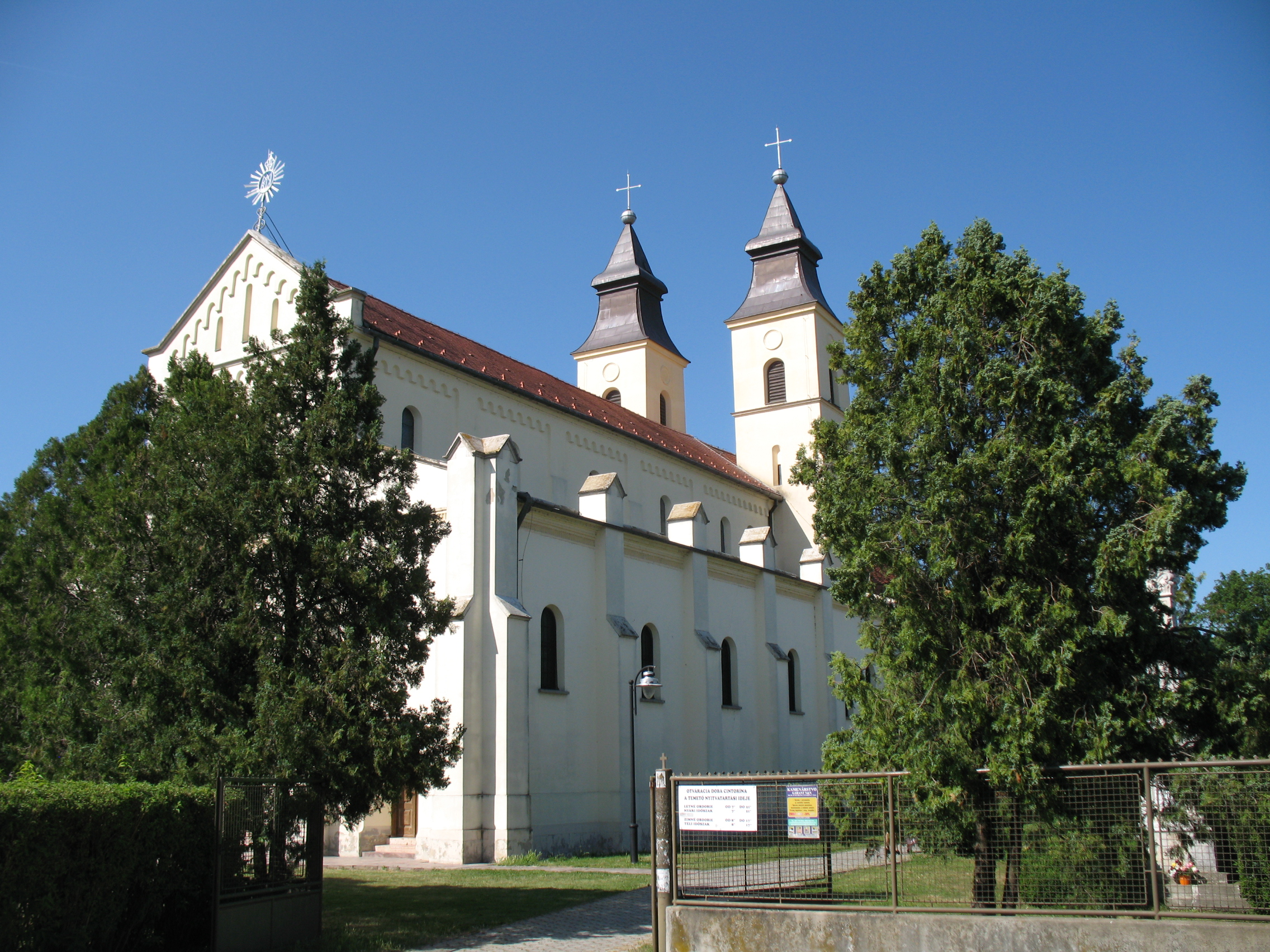 Deáki